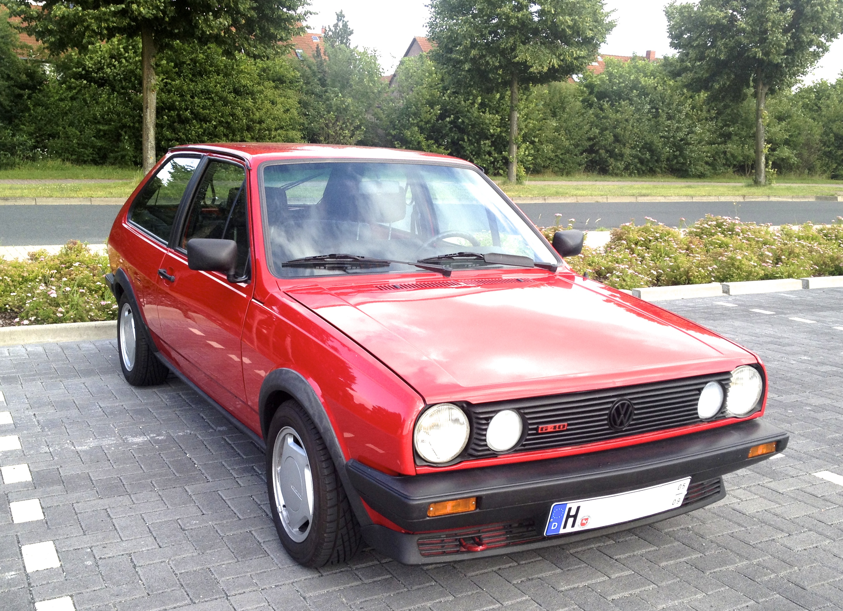 Polo 2 GT G40, Baujahr 1988 - Frontscheibe nicht original.